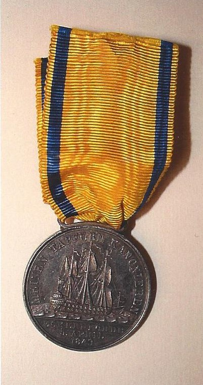 Herzogtum Nassau: Medaille auf das Gefecht bei Eckernförde am 5. April 1849 (Revers)